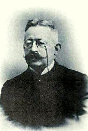 Porträt des Unternehmers Robert Wetzlar